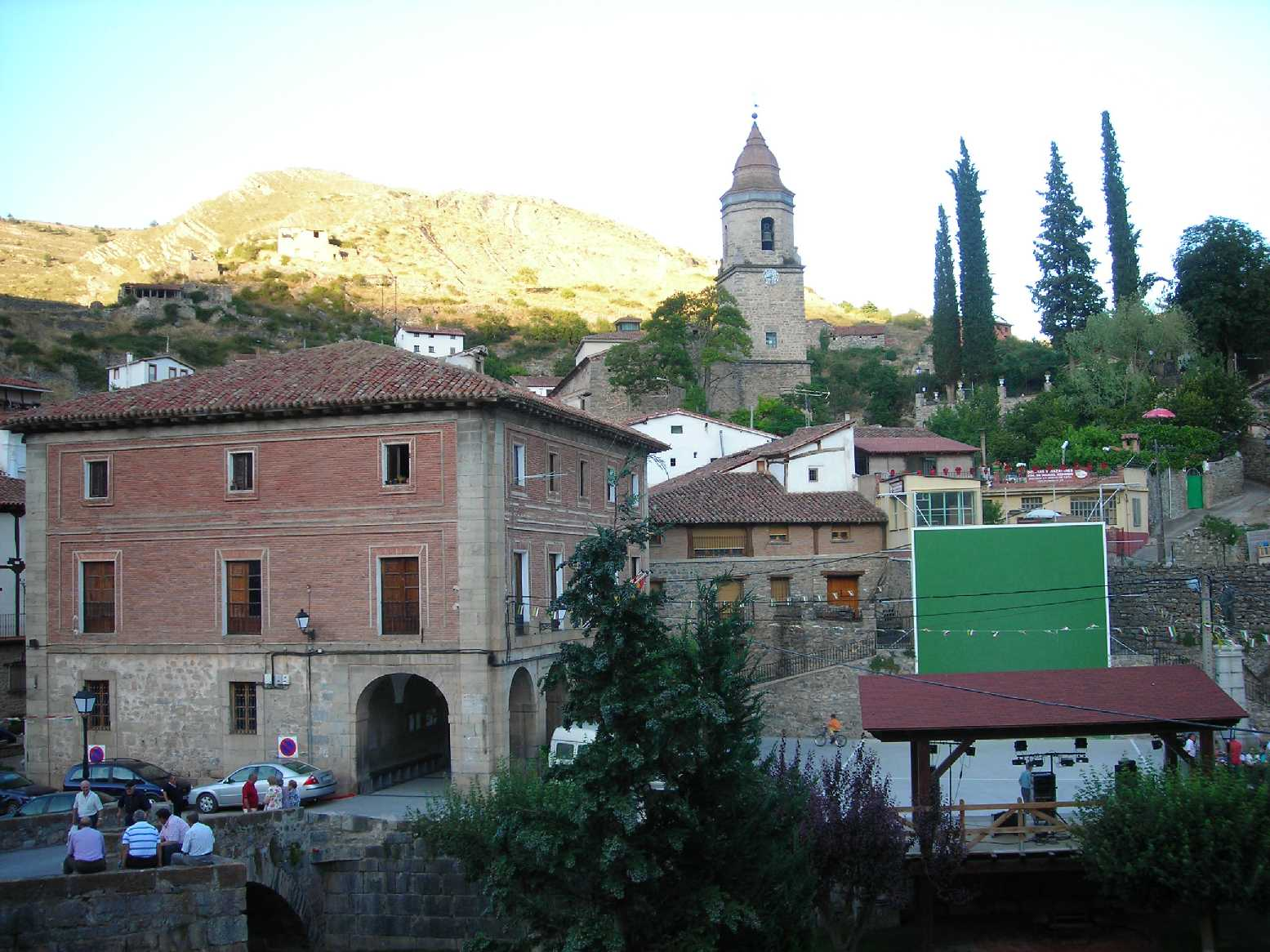 Plaza, frontón, ayuntamiento e iglesia de San Esteban de Soto en Cameros (La Rioja)